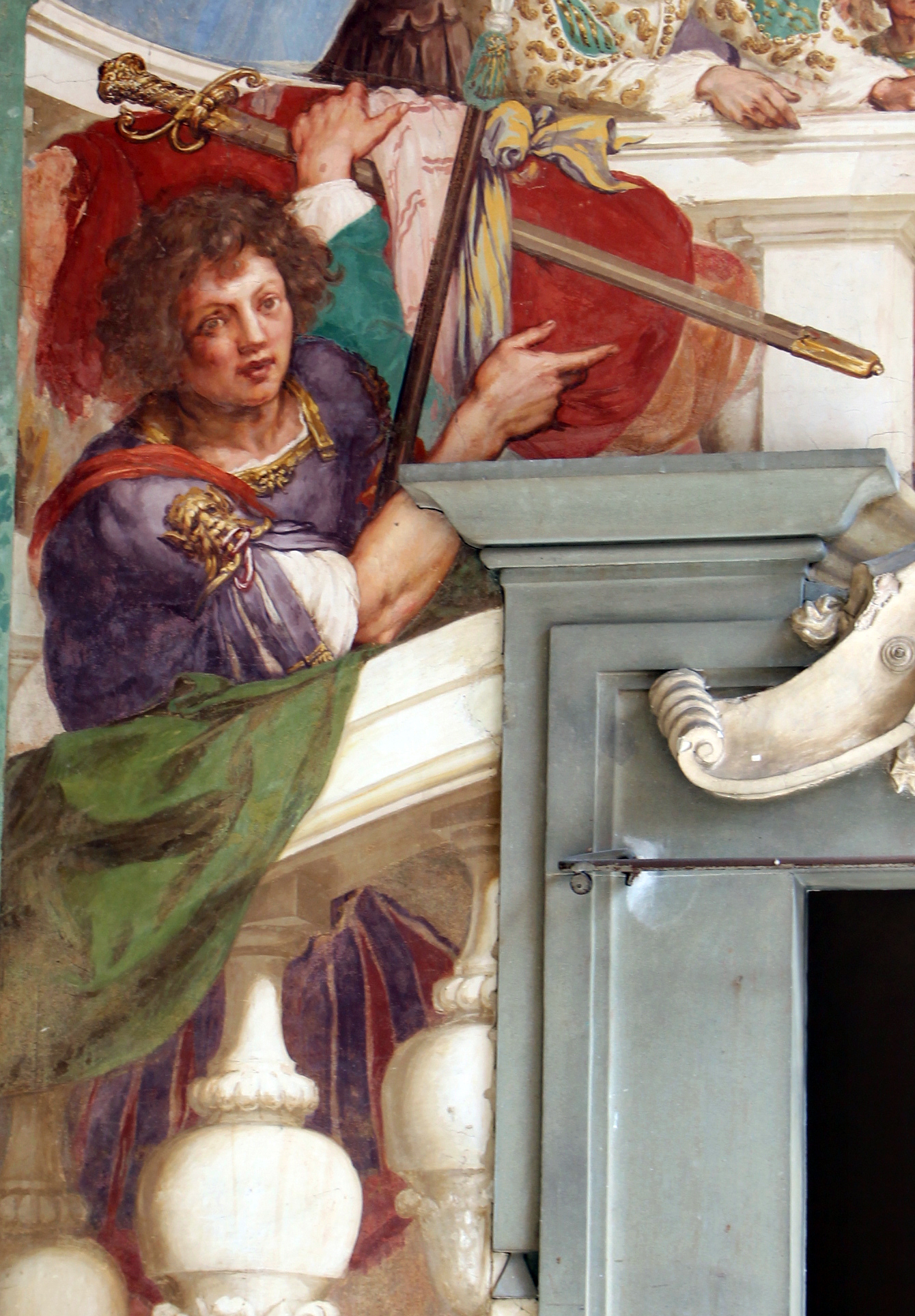 Villa medicea della Petraia - MIBAC The making of this document was supported by Wikimedia CH. (Submit your project!) For all the files concerned, please see the category Supported by Wikimedia CH. This is a photo of a monument which is part of cultural heritage of Italy.